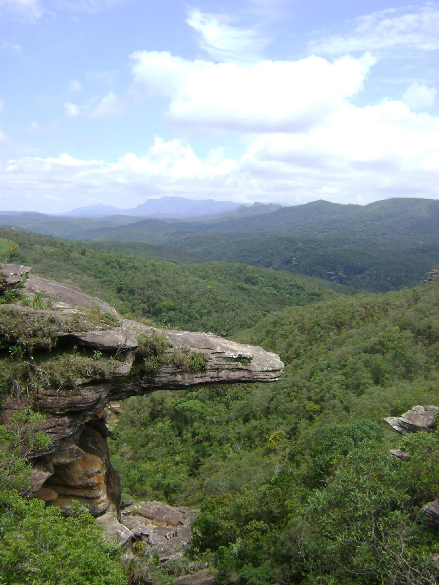 Um registro clássico, porém lindo no Parque das Andorinhas - Ouro Preto (MG)